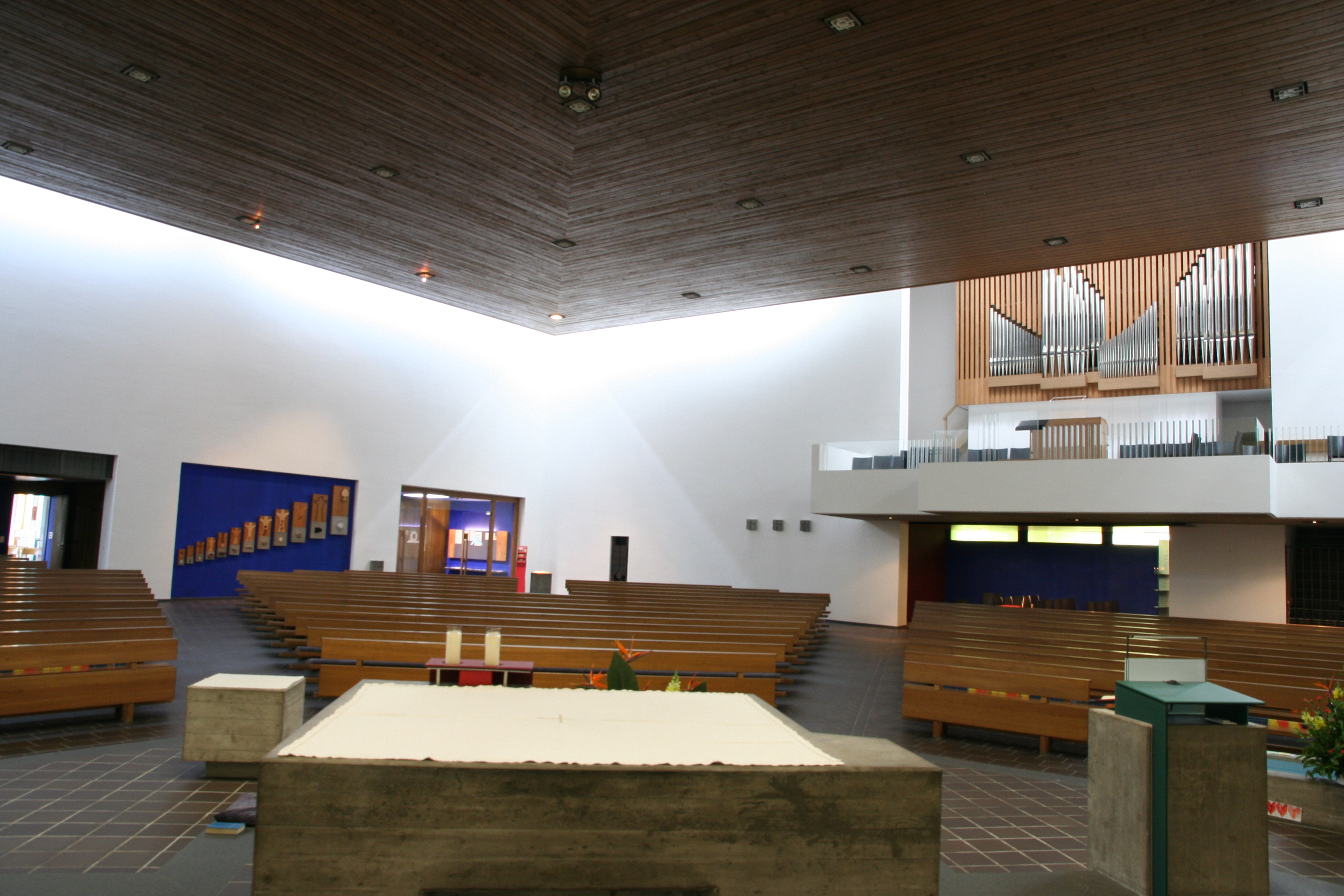 Römisch-katholische Pfarrkirche Dreifaltigkeit Rüti ZH, Innenansicht